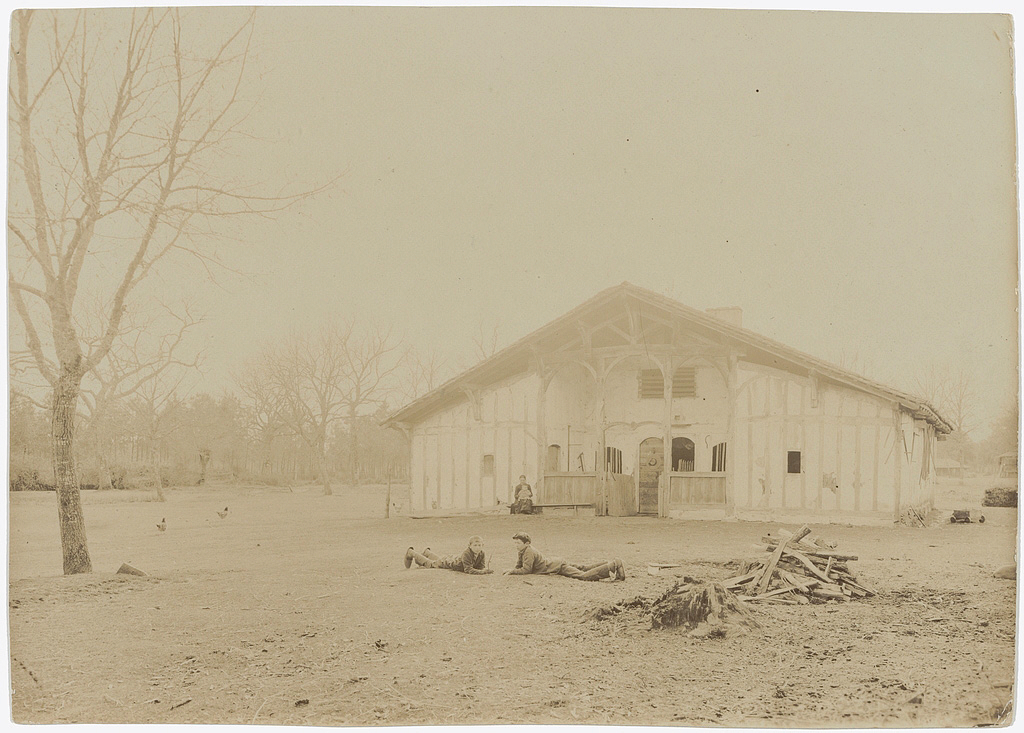 Reproduction numérique d'un tirage positif argentique de Félix Arnaudin figurant la Maison de Tartas à Sabres vers 1907 (12,2 x 17,3 cm).